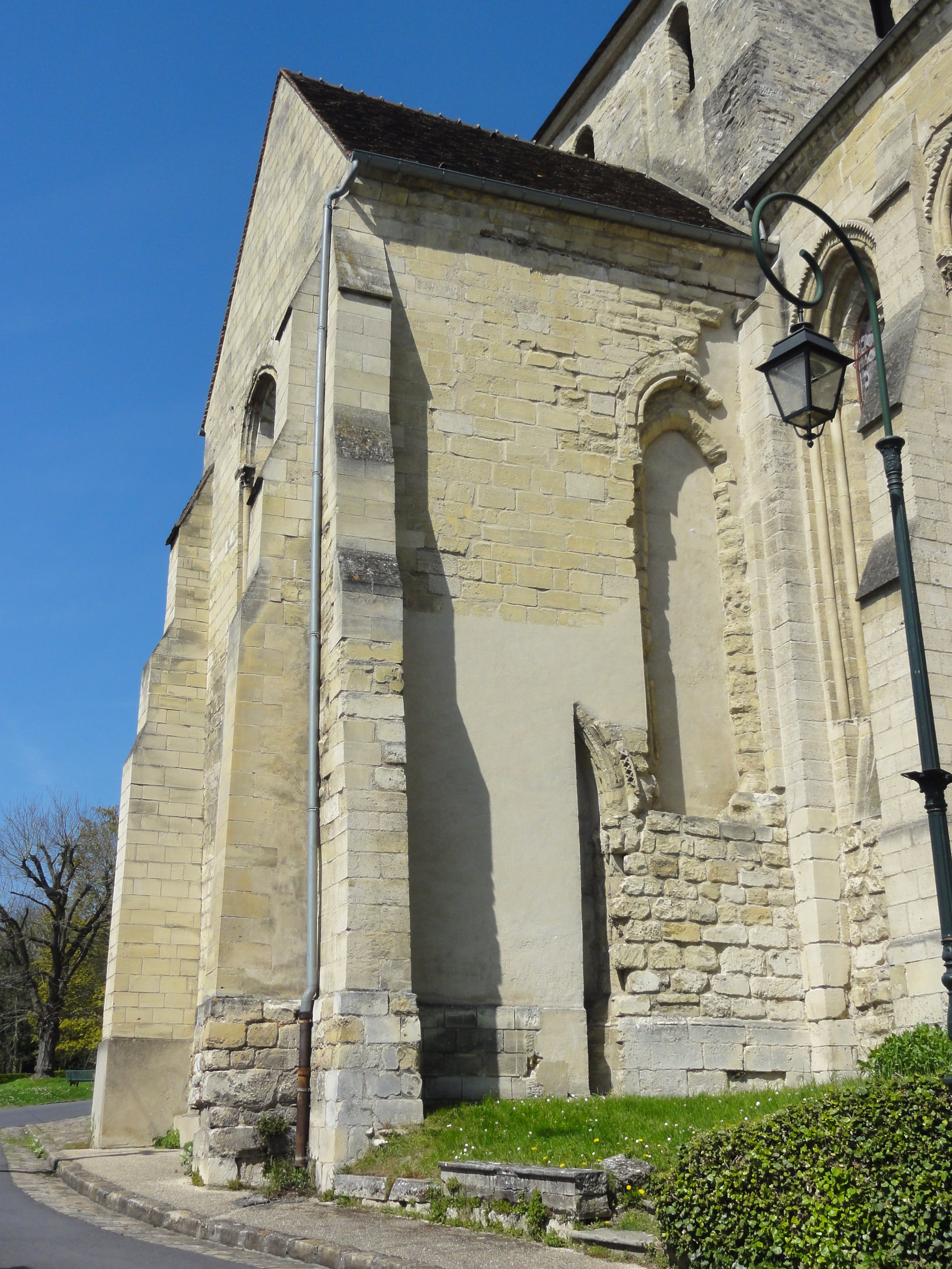 Église Saint-Pierre-aux-Liens de Vaux-sur-Seine - voir titre.